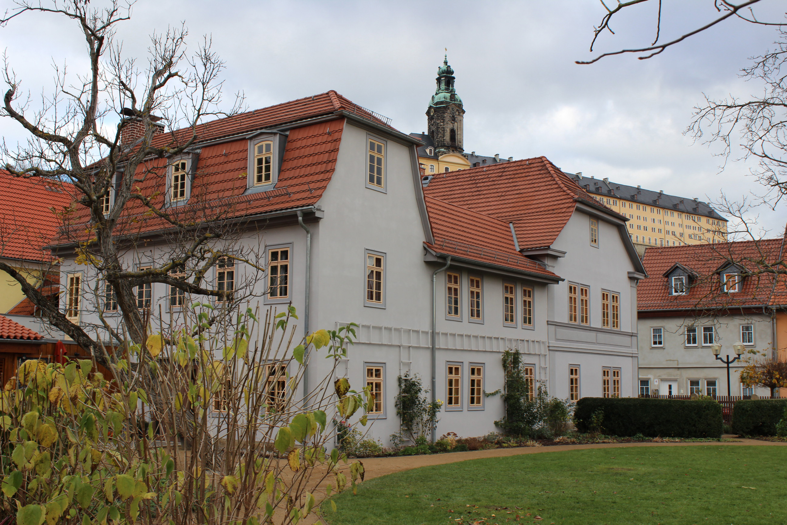 Das Schillerhaus in Rudolstadt, bekannt als das Beulwitzsche Haus. Hier begegneten sich Friedrich Schiller und Johann Wolfgang Goethe erstmals am 7. September 1788.